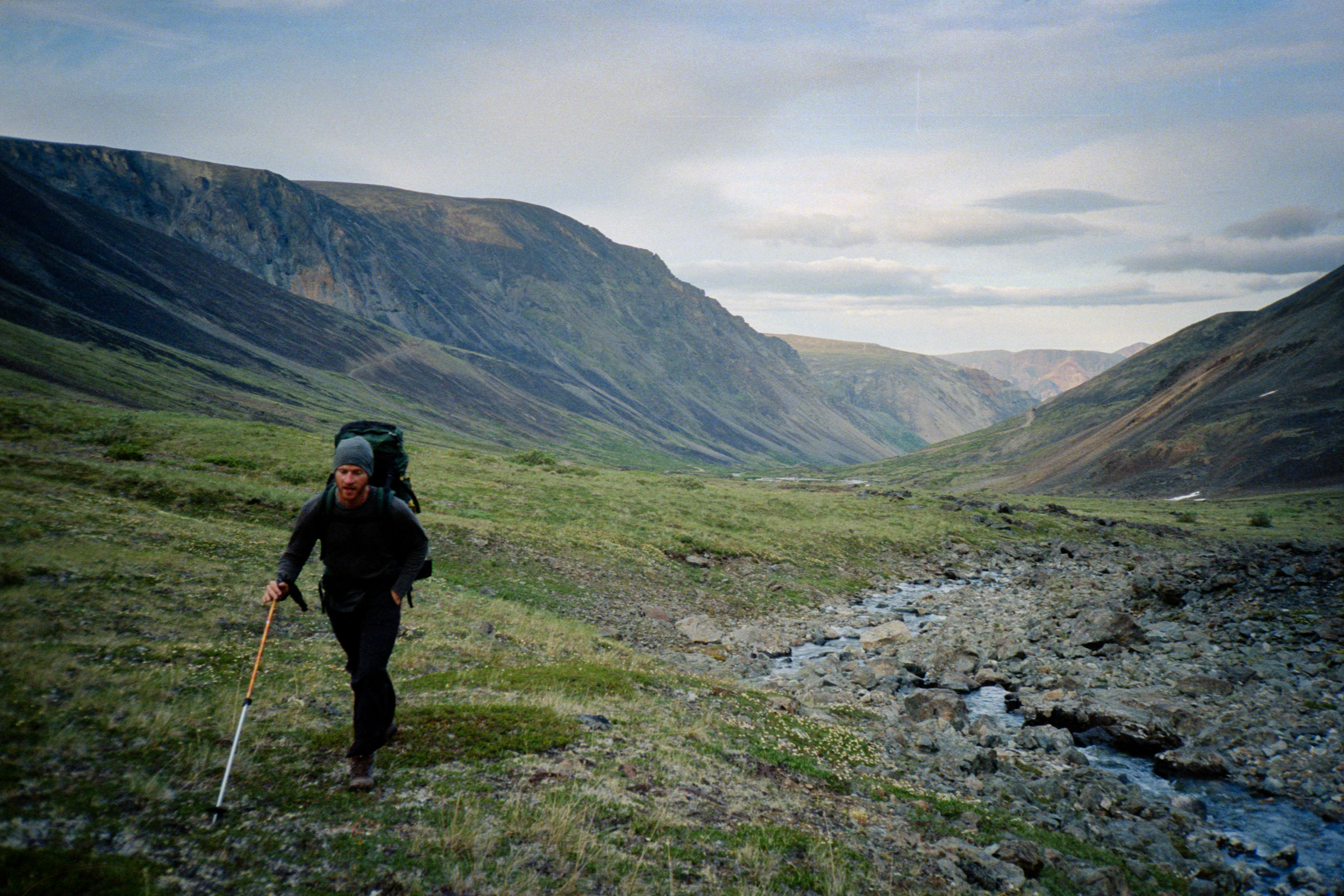 Hiking up Skukum Creek